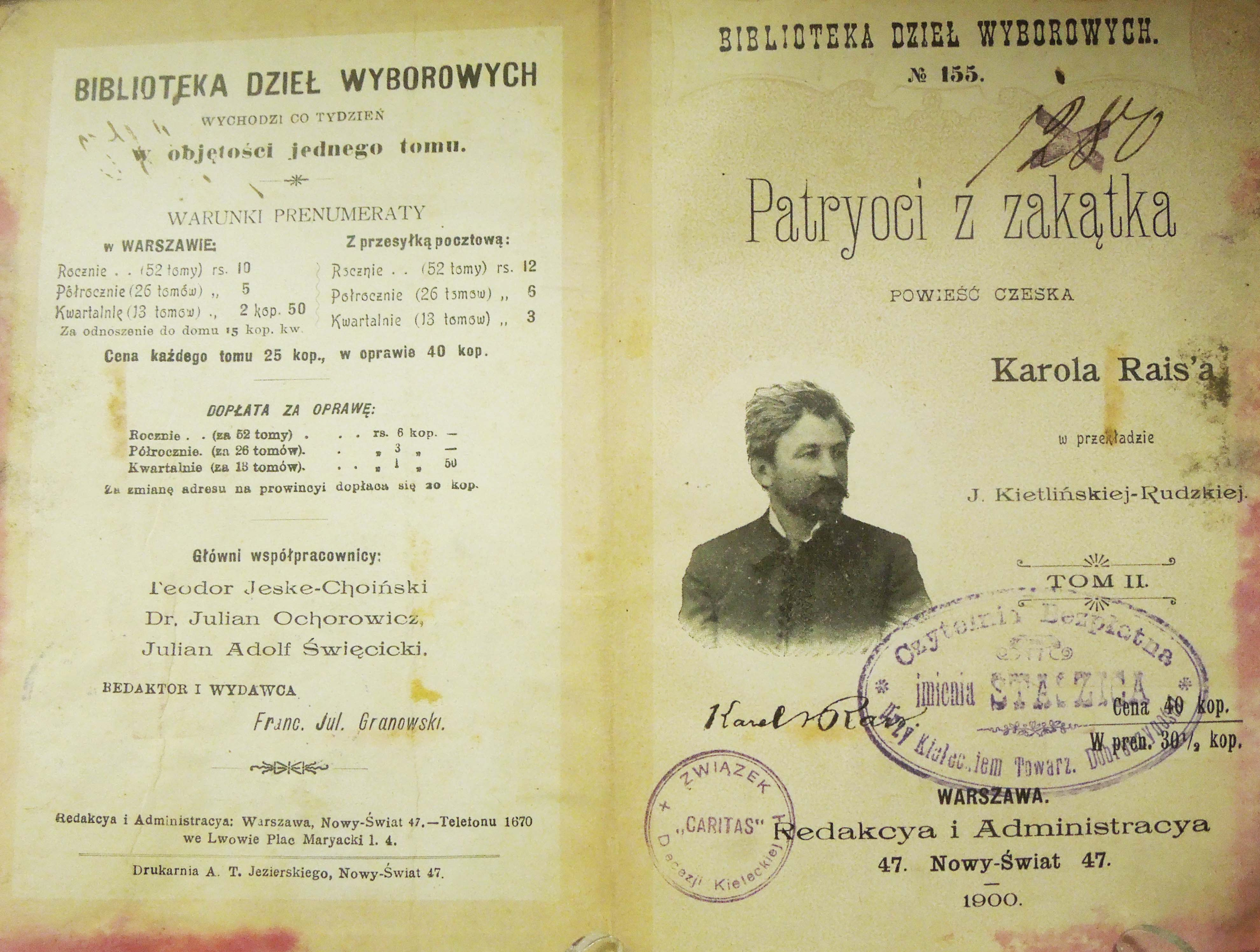 Karel Václav Rais - Patrioci z zakątka, książka wydana w serii Biblioteka Dzieł Wyborowych, strona tytułowa; Muzeum Historii Kielc